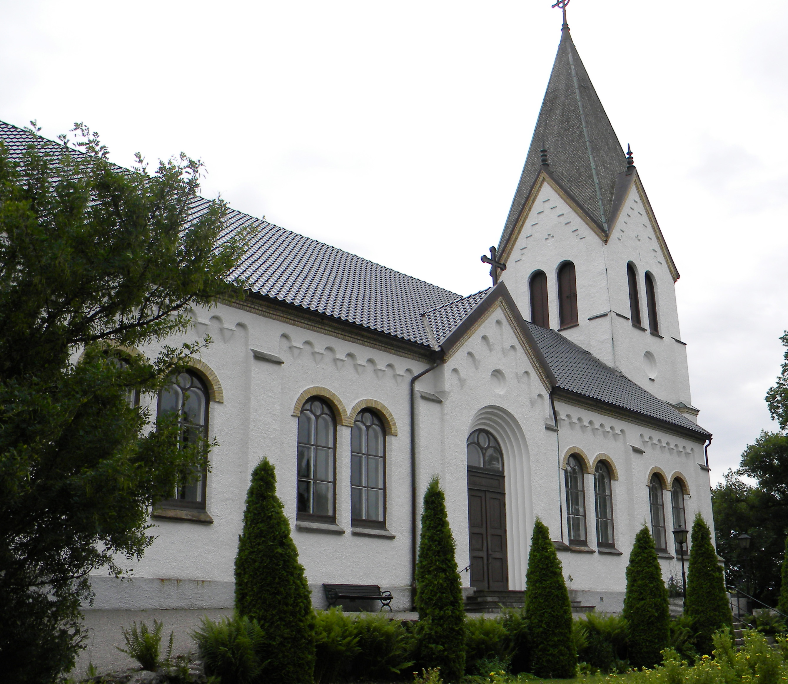 Frillesås kyrka